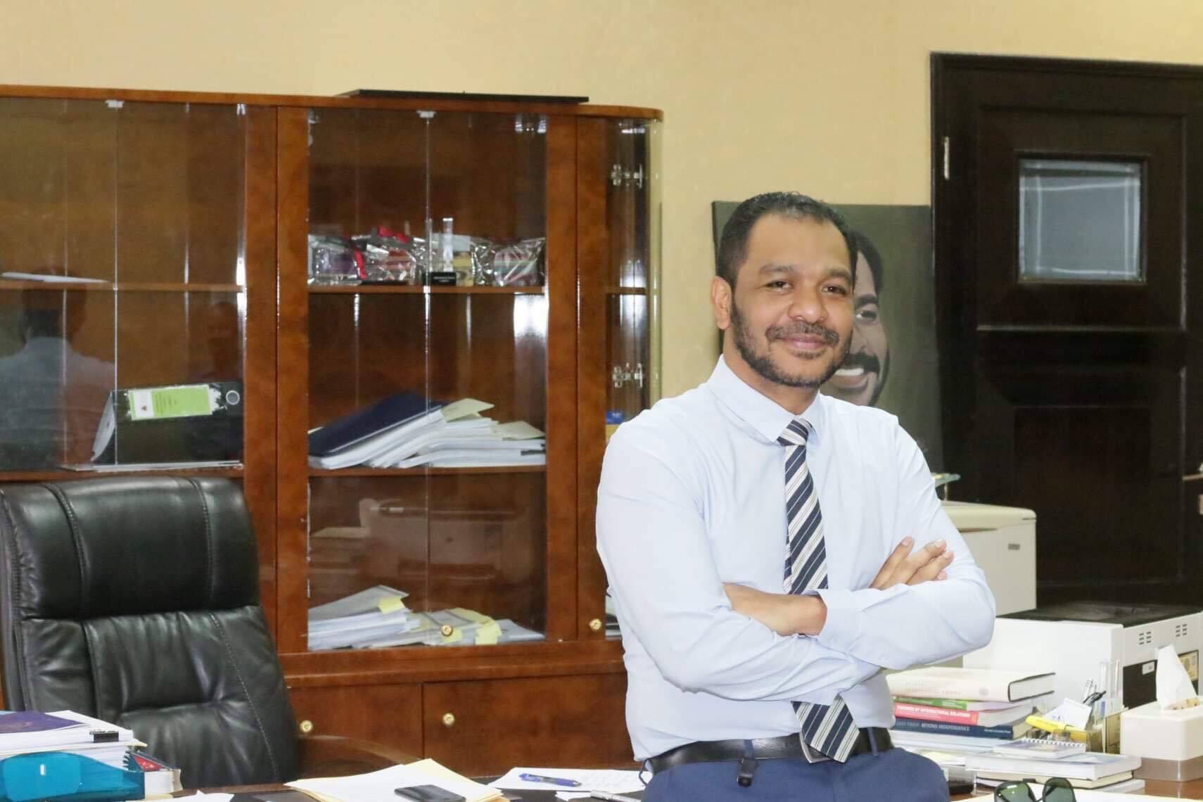 Fidelis Leite Magalhães, osttimoresischer Minister